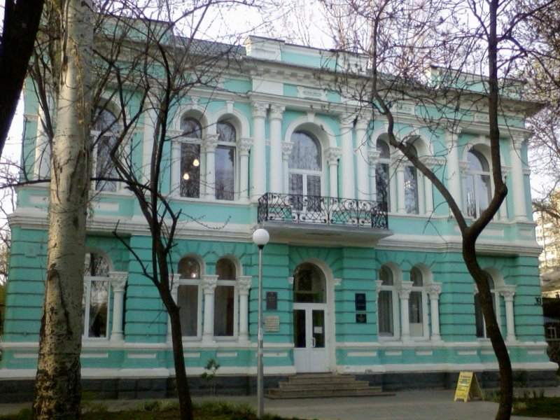 Будинок купця Єзрубільського в Бердяську. Початок 20 століття. В 1930-х роках санаторій радянських військових льотчиків, нині Бердянська музична школа